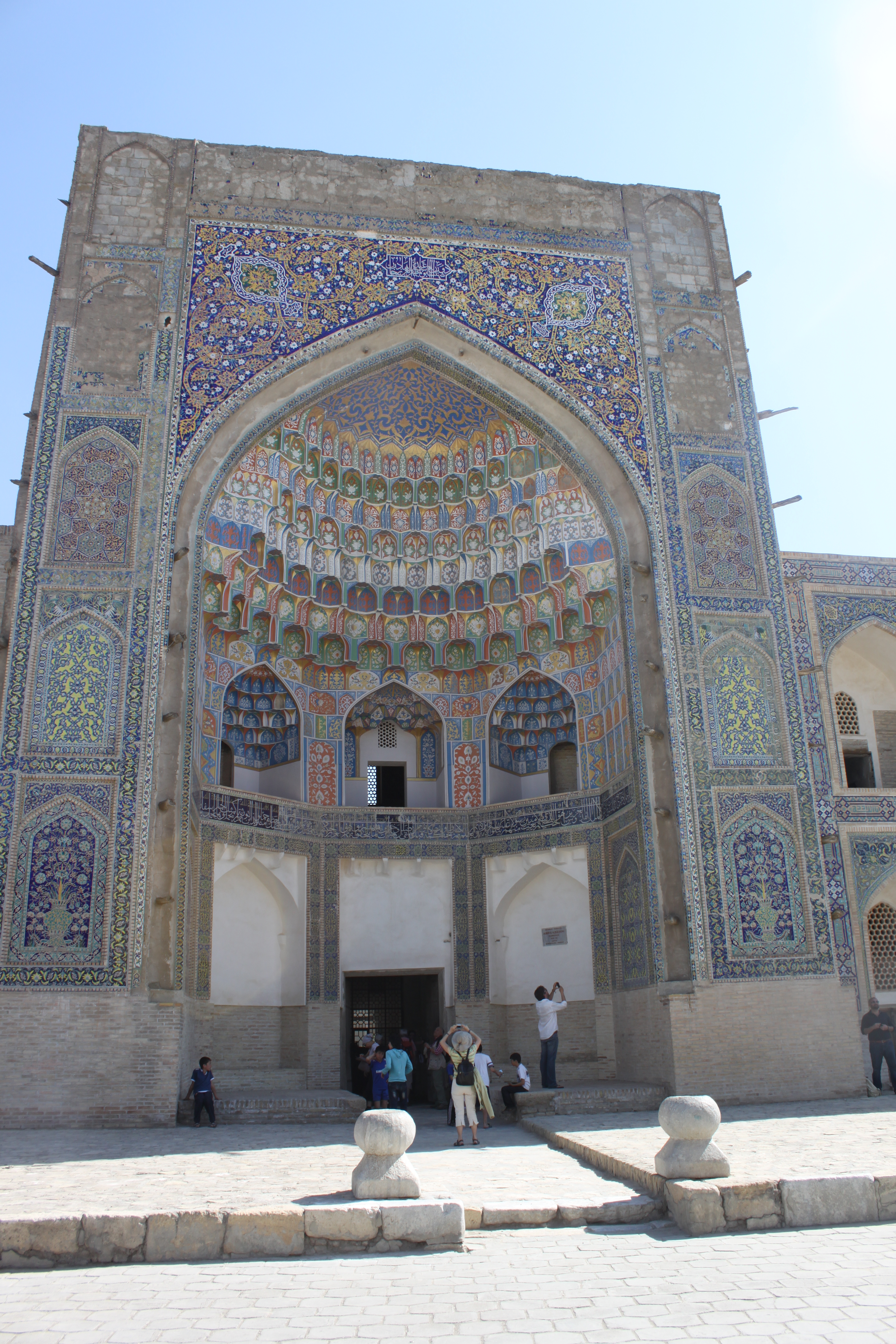 Portail de la madrasa Abdullaziz Khan